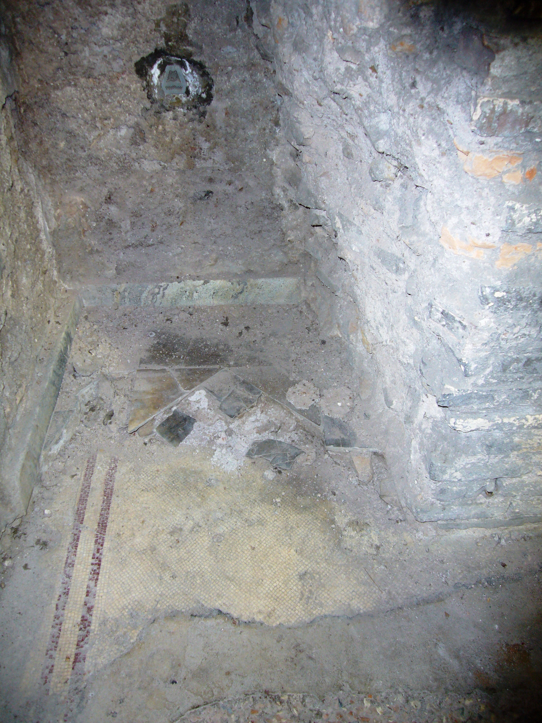 Roma, Auditorium di Mecenate: tracce di pavimentazioni successive